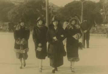 Евгения Климентьевна Демидова с дочерьми (слева направо) Евгенией, Авророй, Еленой Анатольевными в Ницце. Фотография, 1925 г. Из собрания А. Тиссо